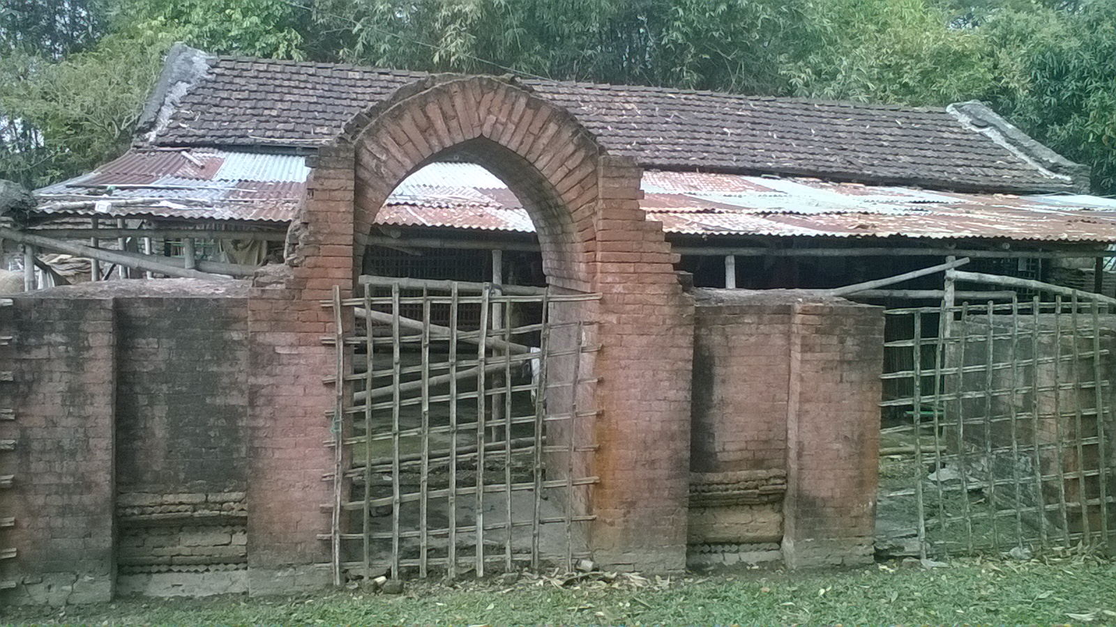 সাত গাছিয়া ৩৫ গুম্বুয আদিনা মসজিদ-01,কালীগঞ্জ উপজেলা, ঝিনাইদহ